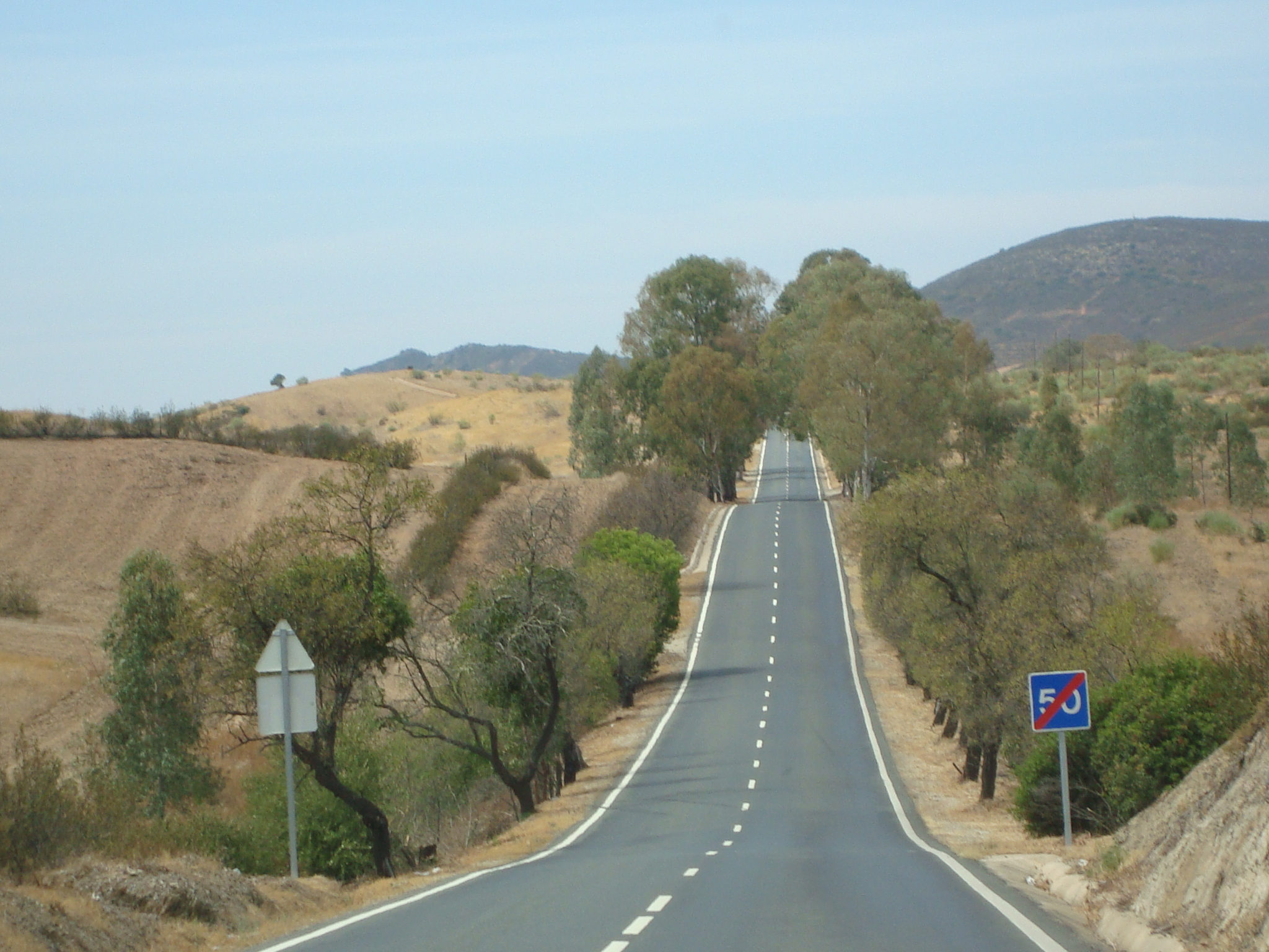 Tramo de la N122 (Beja-Vila Real de Santo António). Fue una carretera nacional de primera clase según el Plan Nacional de Carreteras de 1945.